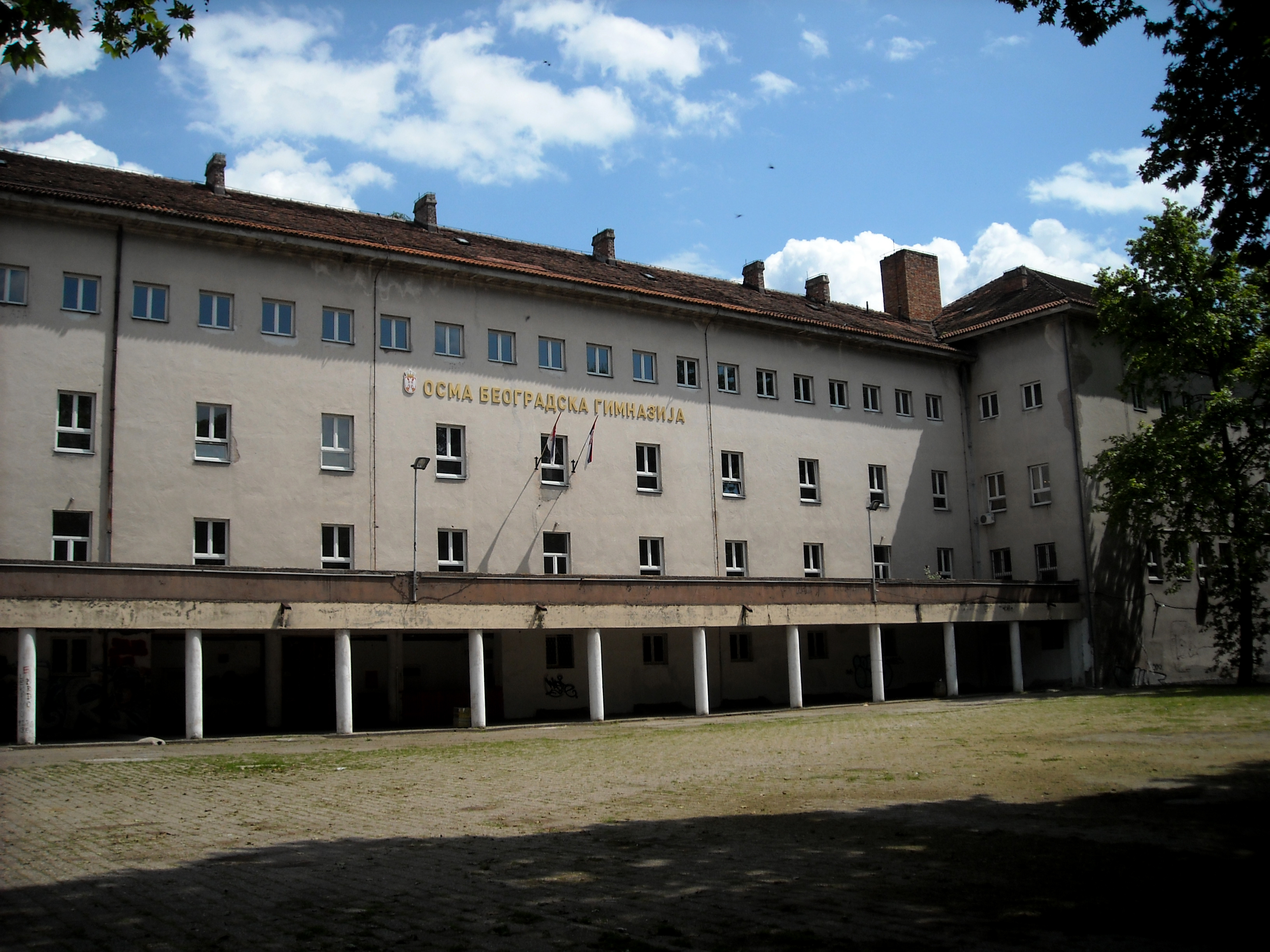 Osma beogradska gimnazija